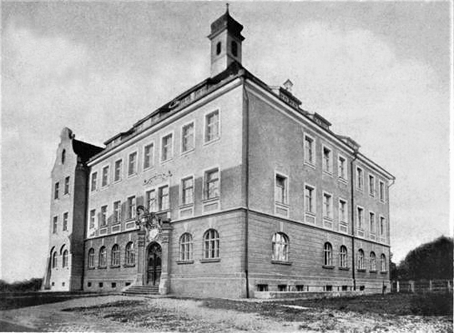 Ehemaliges Lehrerseminar in Lauingen (gegr. 1841) um 1920